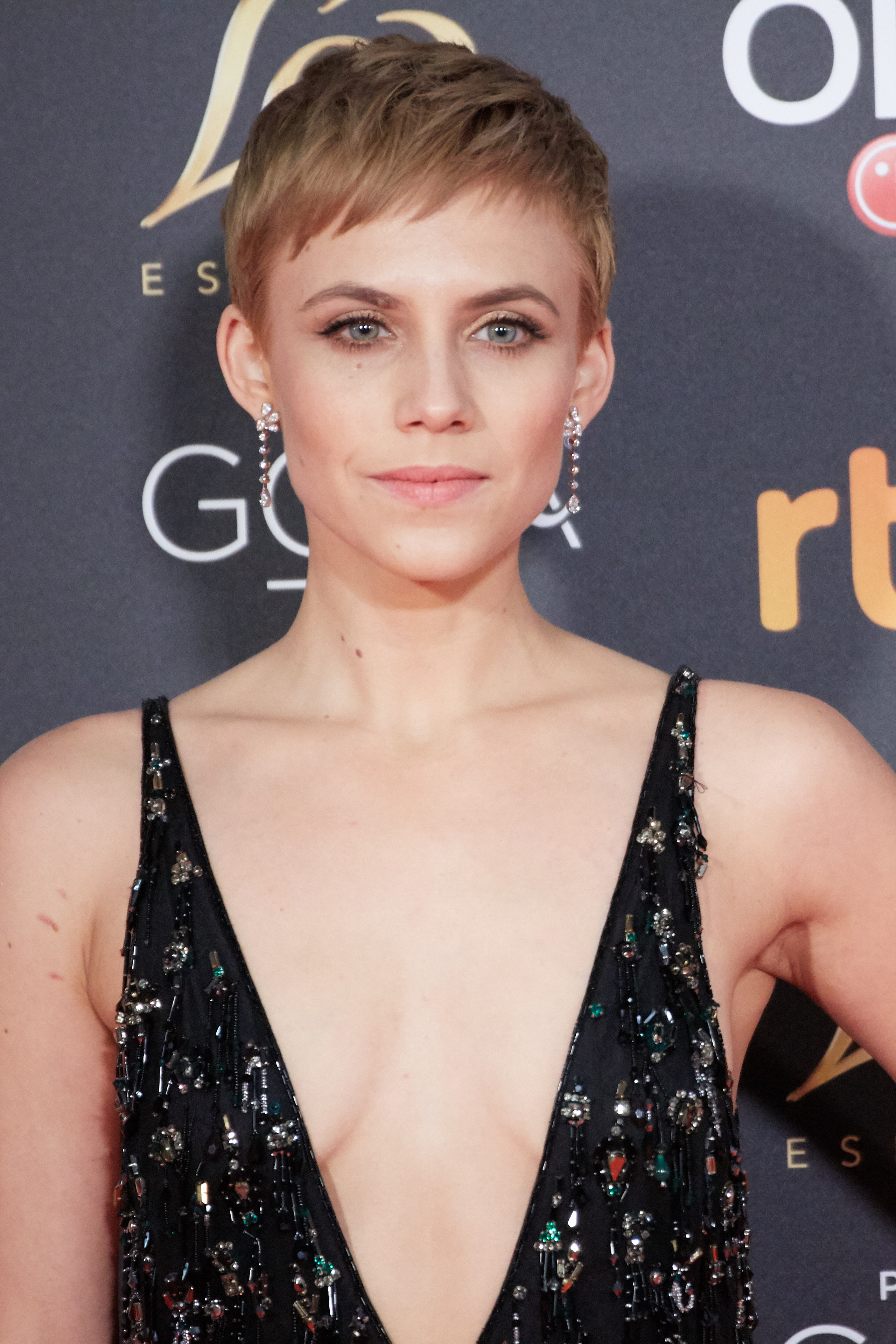 Aura Garrido en la alfombra roja de los Premios Goya celebrados en Sevilla en Febrero 2019